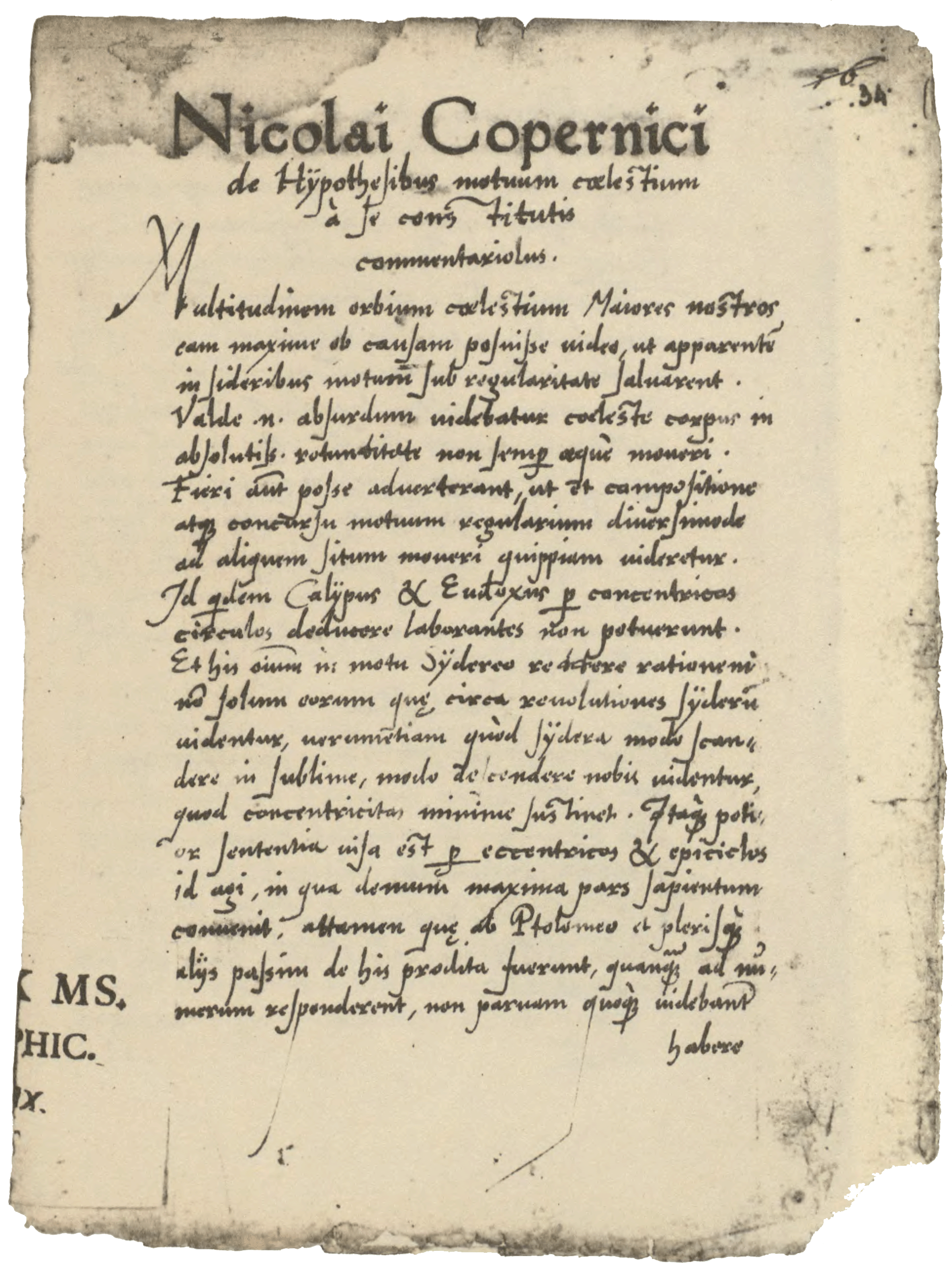 Blatt 34 des Manuskriptes 10530 aus der Österreichischen Nationalbibliothek mit dem Titel Nicolai Copernici de hypothesibus motuum coelestium a se constitutis commentariolus